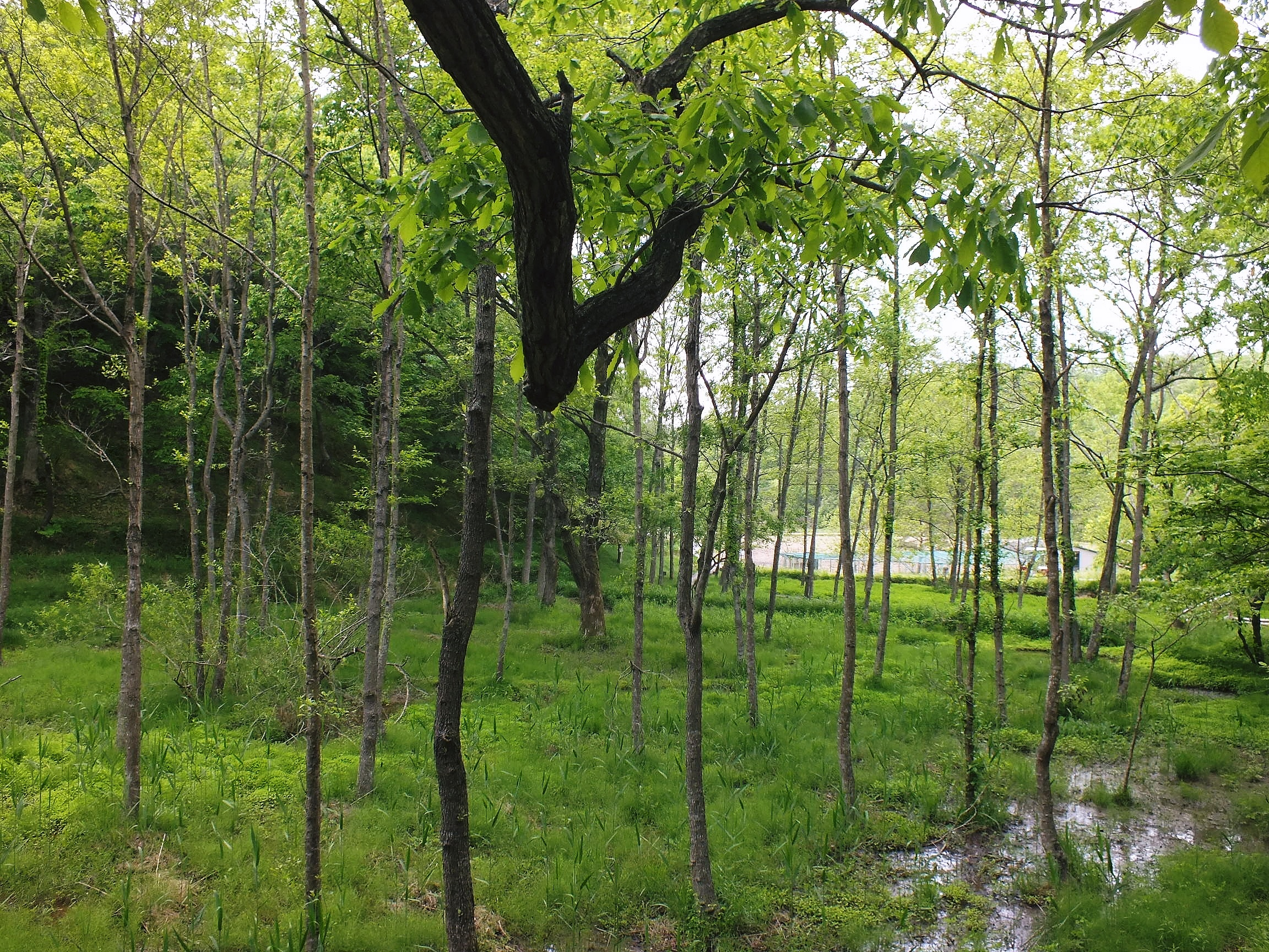 Alnus japonica ハンノキ やしろの森公園